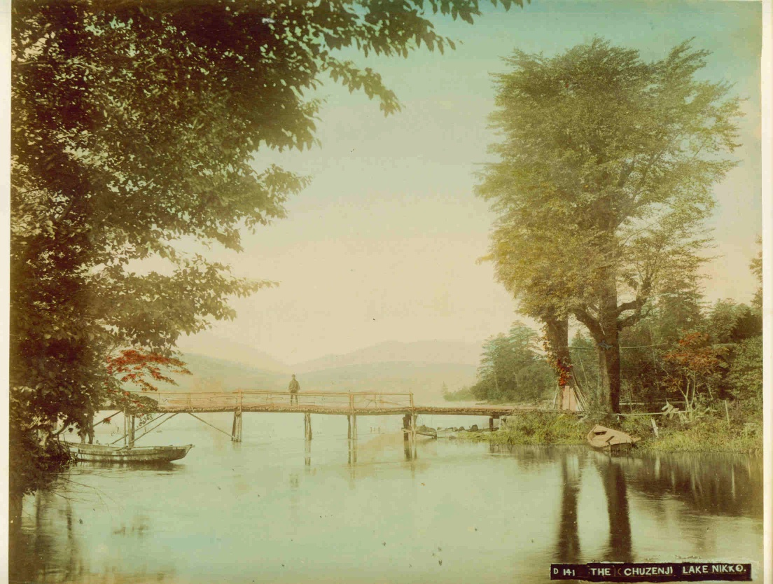 Fotograf: Ogawa Kazumasa (Nagasaki ID 1159). “D 141 The Chuzenji Lake Nikko”. (einbelichteter Original-Titel). Die Ojiri-Brücke an der Mündung des Ojiri-Flusses in den Chuzenji-See. Handkoloriertes Albumin-Foto ca. 1880. Foto: 22 x 27,5 cm quer (aufgezogen auf Karton: 33 x 48,5 cm quer).